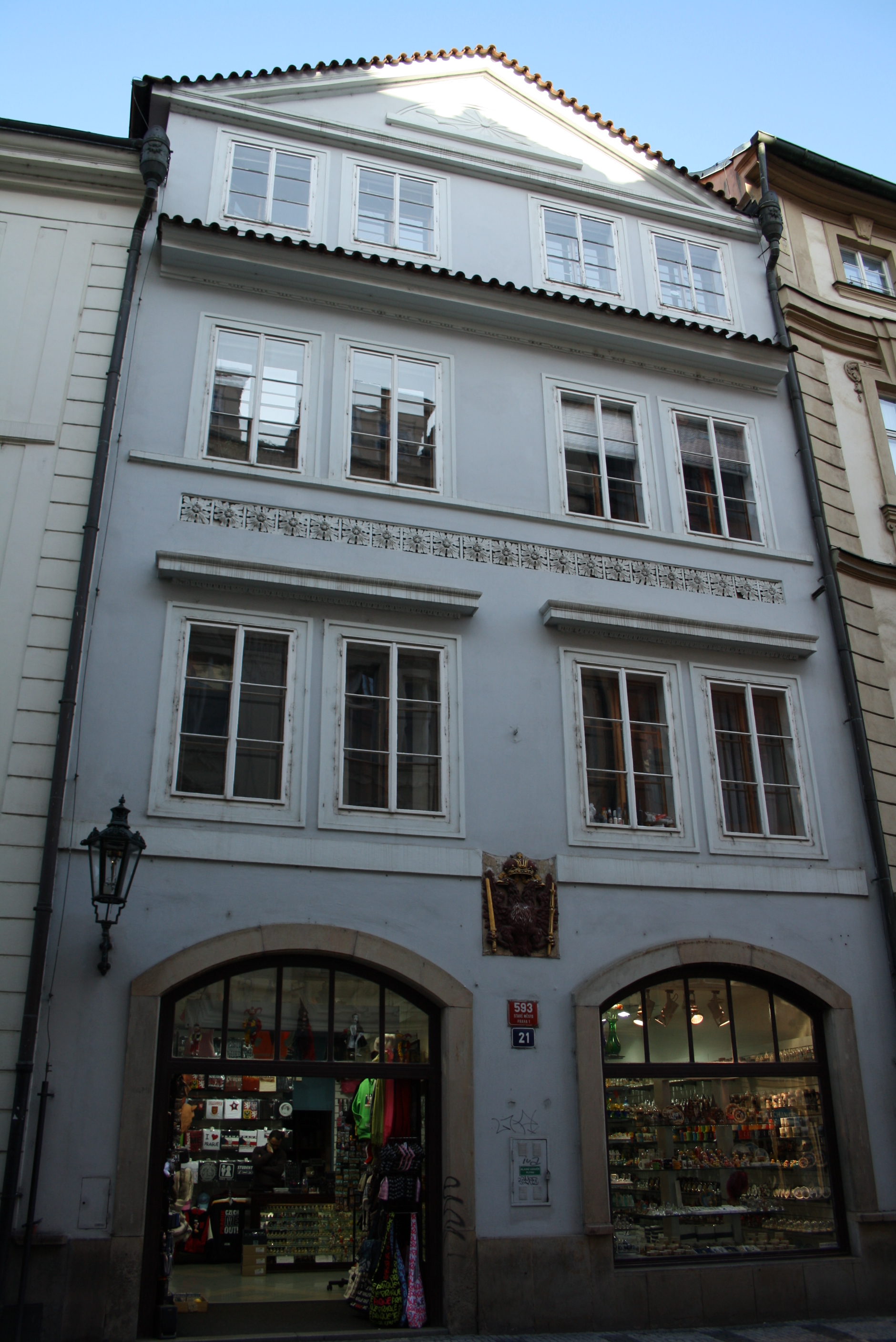 Dům U Červeného orla v Celetné ulici v Praze